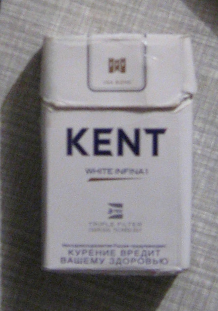 Сигареты "Kent White Infina 1" (старый дизайн пачки)